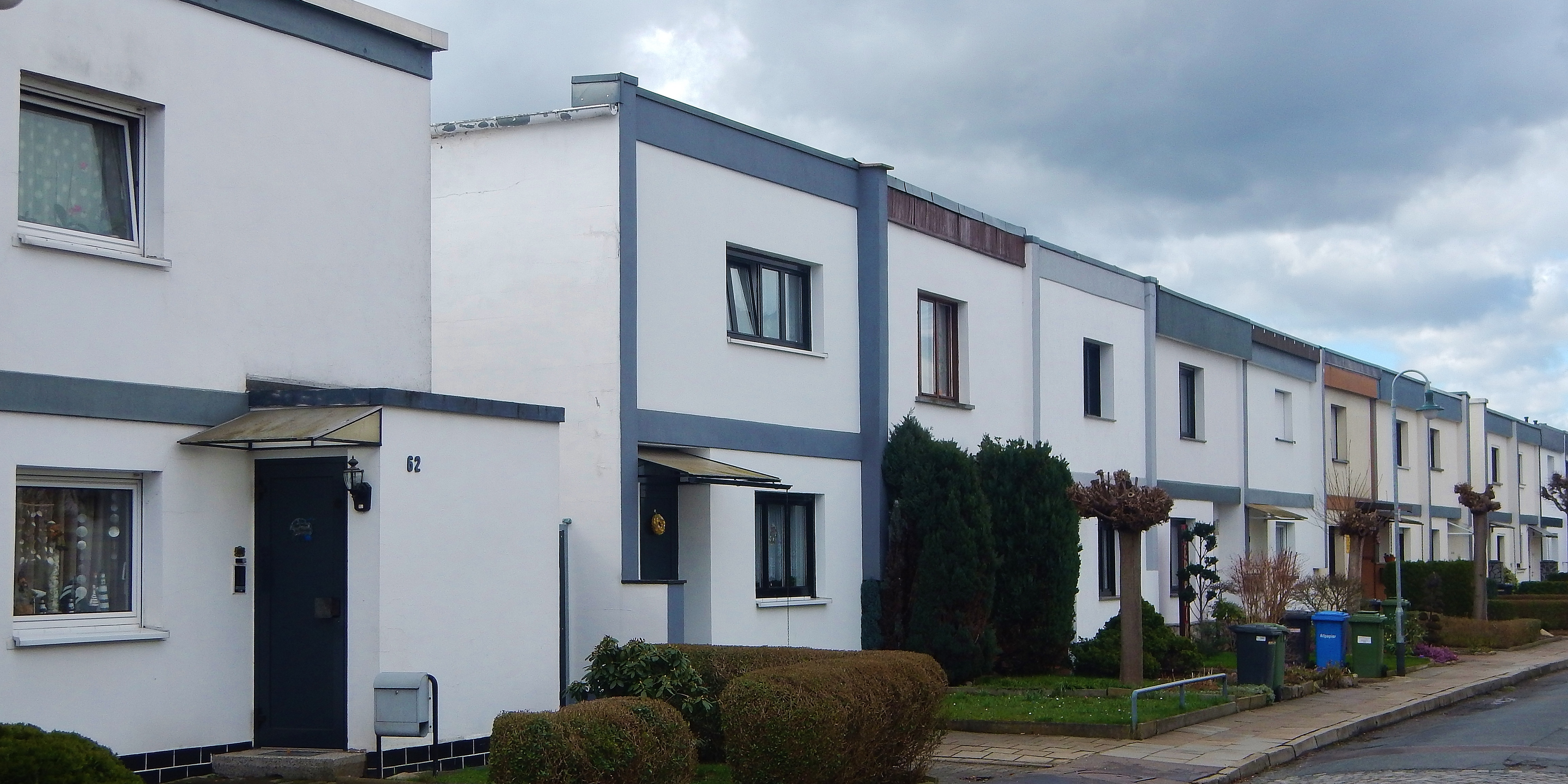 Häuser aus der Bauhaus-Zeit in Dessau-Törten